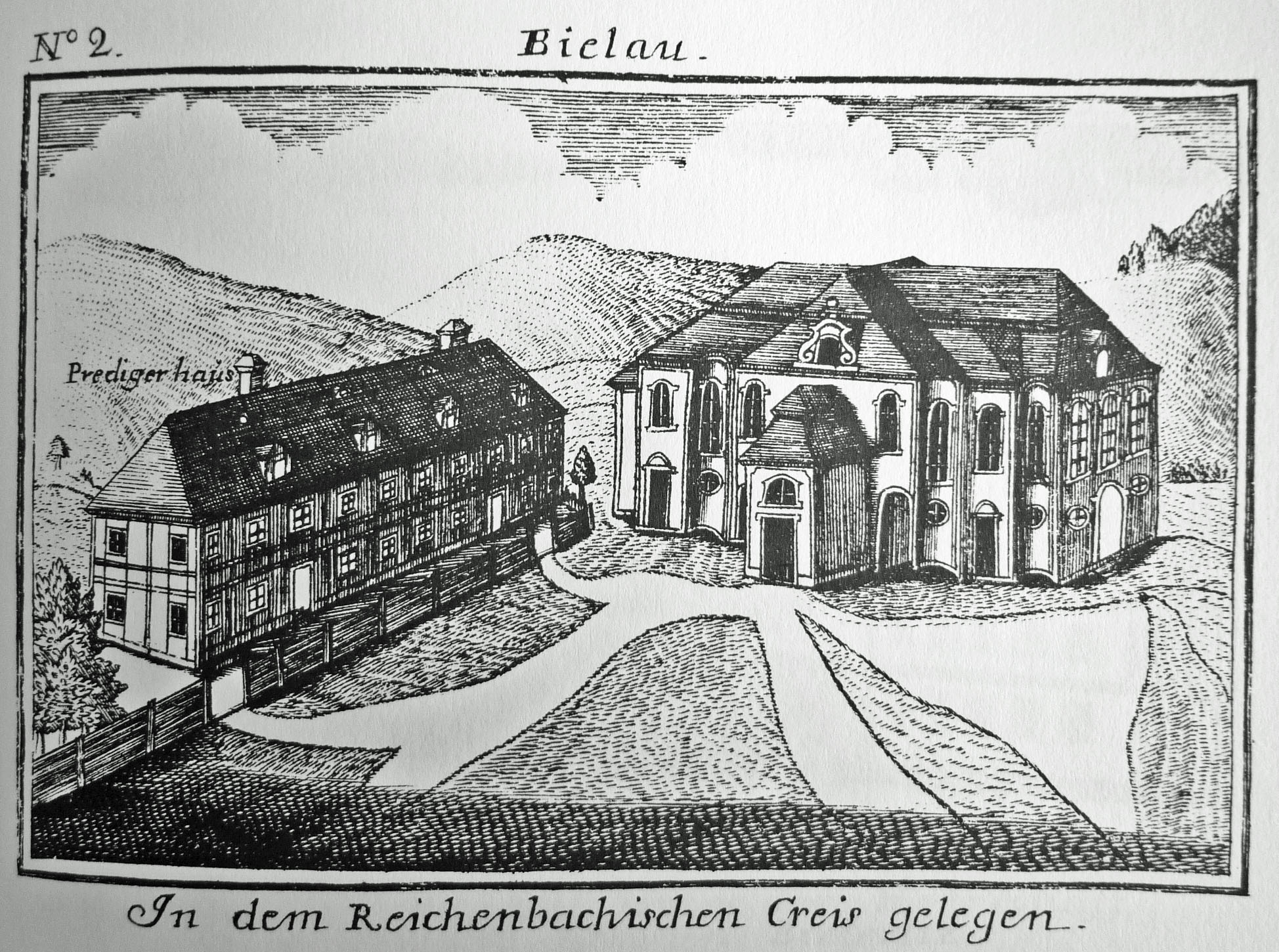 Evangelisches Bethaus in Langenbielau in Schlesien